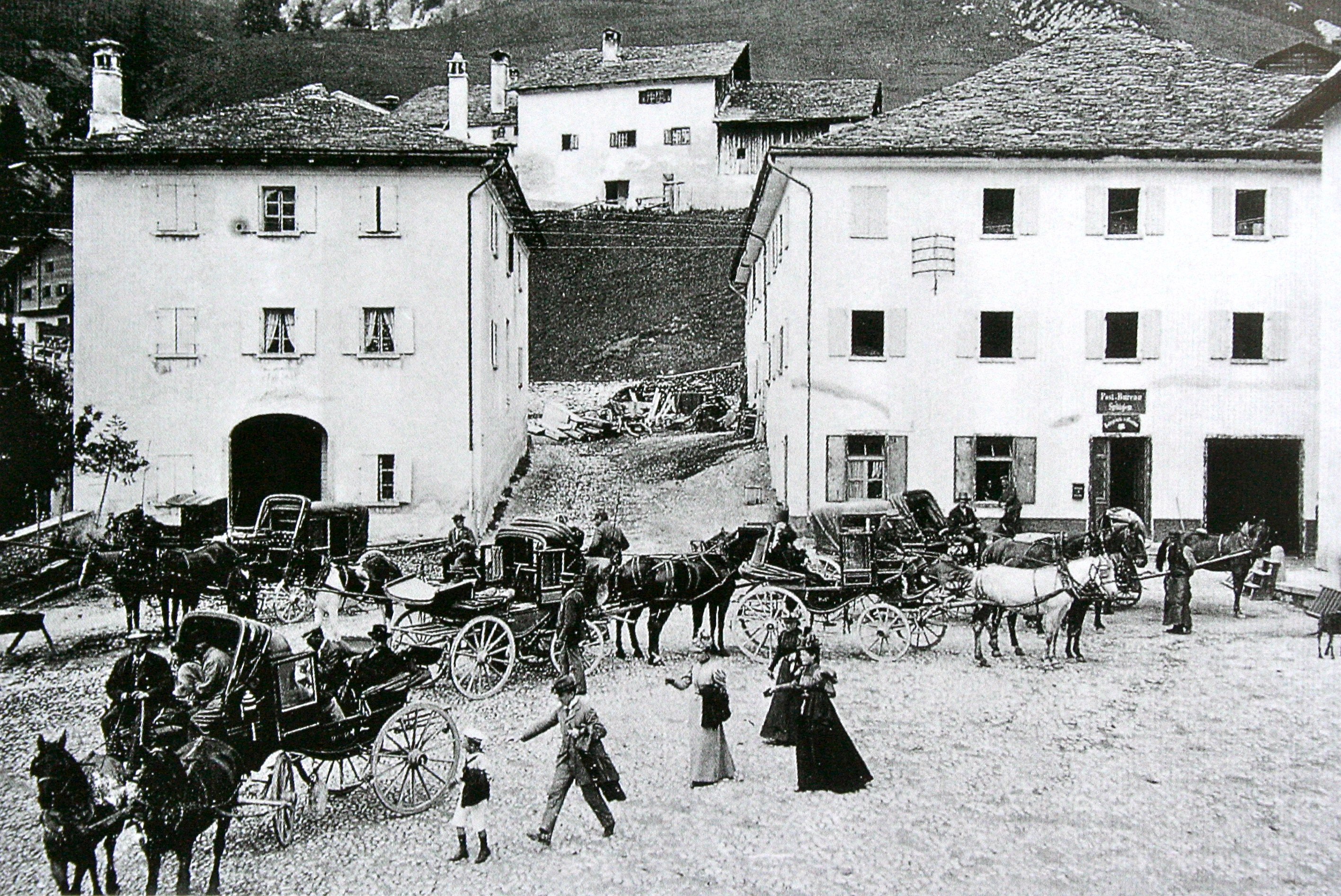 Hotel Bodenhaus in Splügen; Bodenplatz um 1900